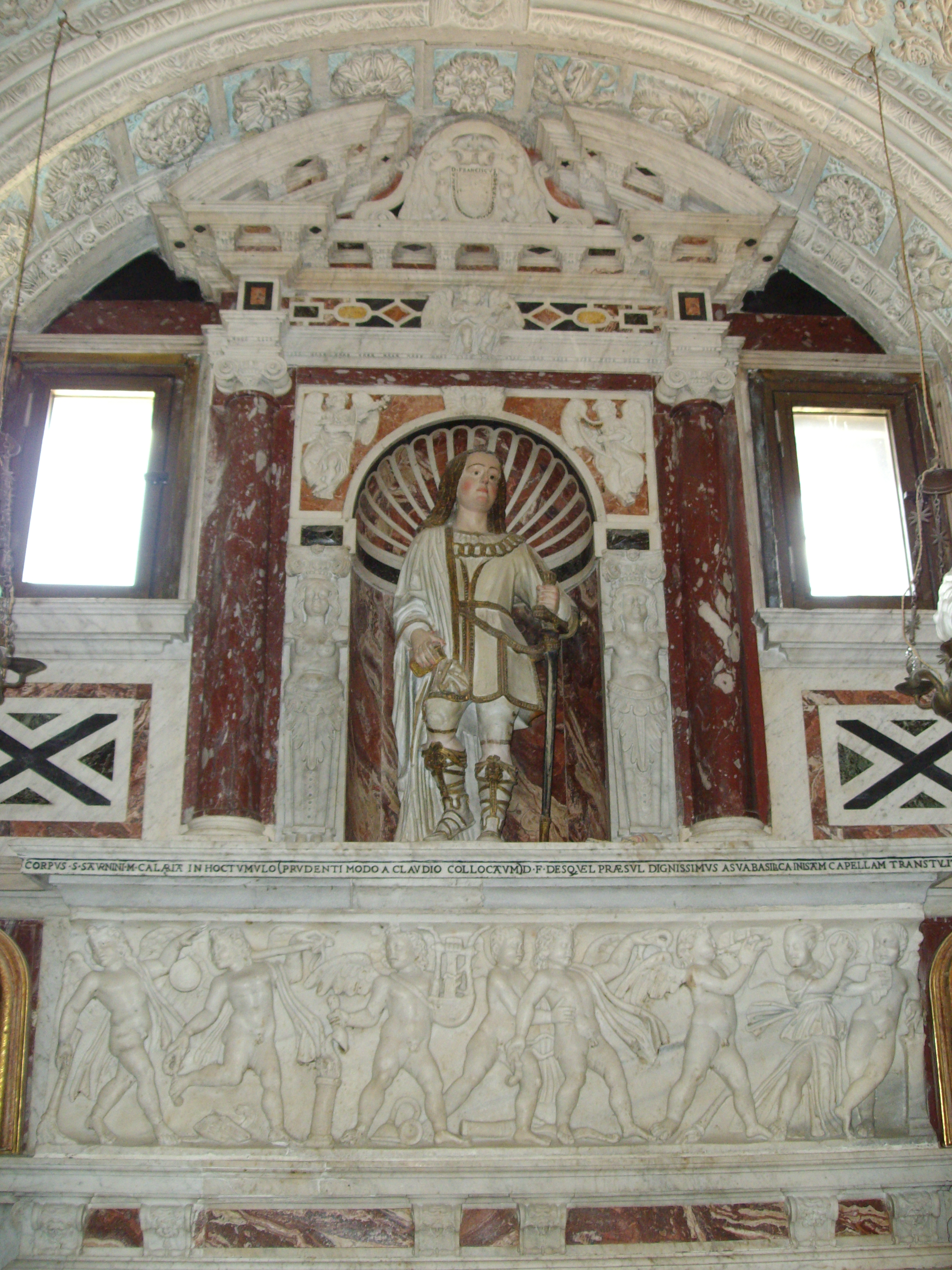 Cappella di San Saturnino nel Santuario dei Martiri - Cattedrale di Cagliari